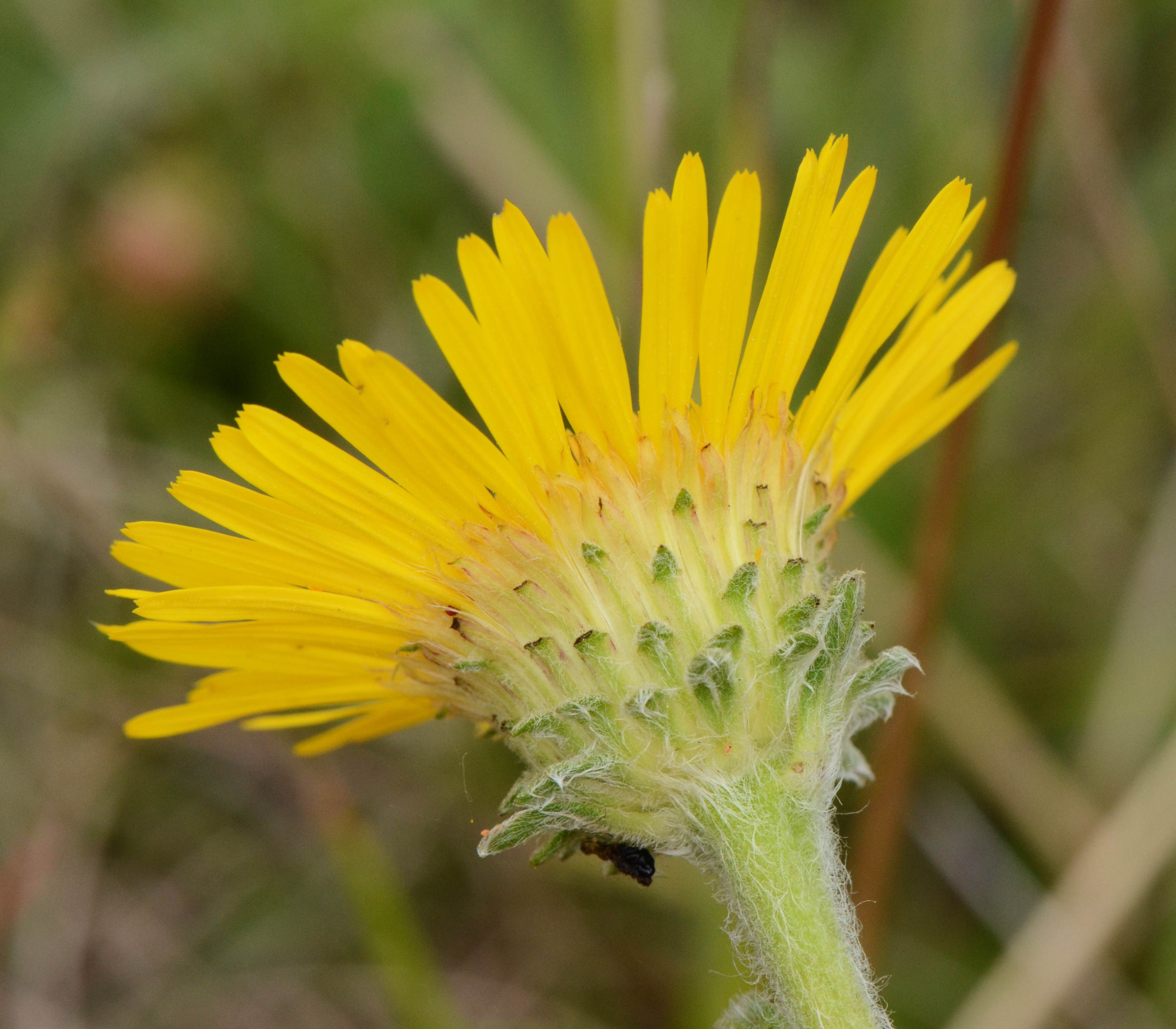 Inula montana, Inule des montagnes, chaume de Soubérac 16100, France